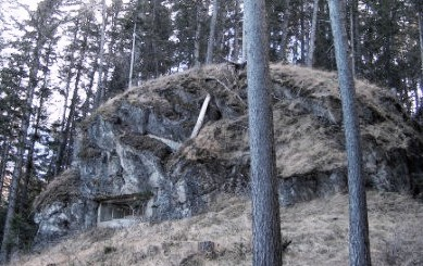 Opera 9, tenne